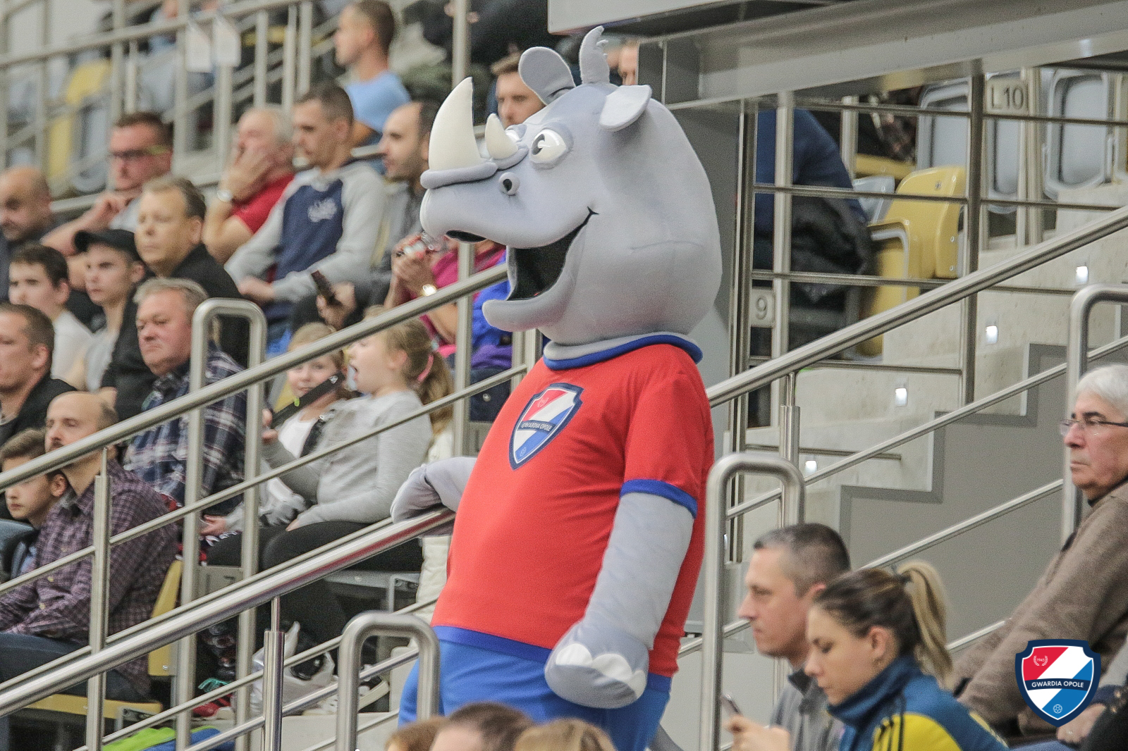 Nosorożec, maskotka Gwardii Opole